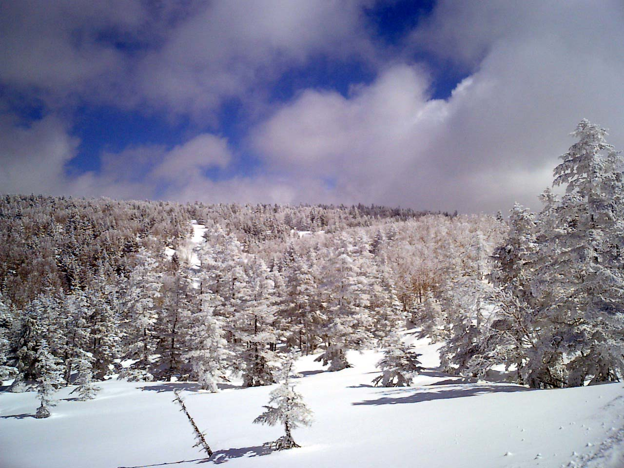 竜王スキーパーク山頂付近